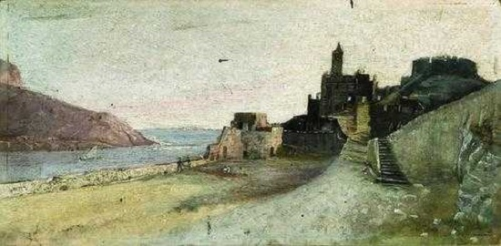 Veduta di Porto Venere, olio su tavola cm 19,2 x 40, firmato, coll. privata